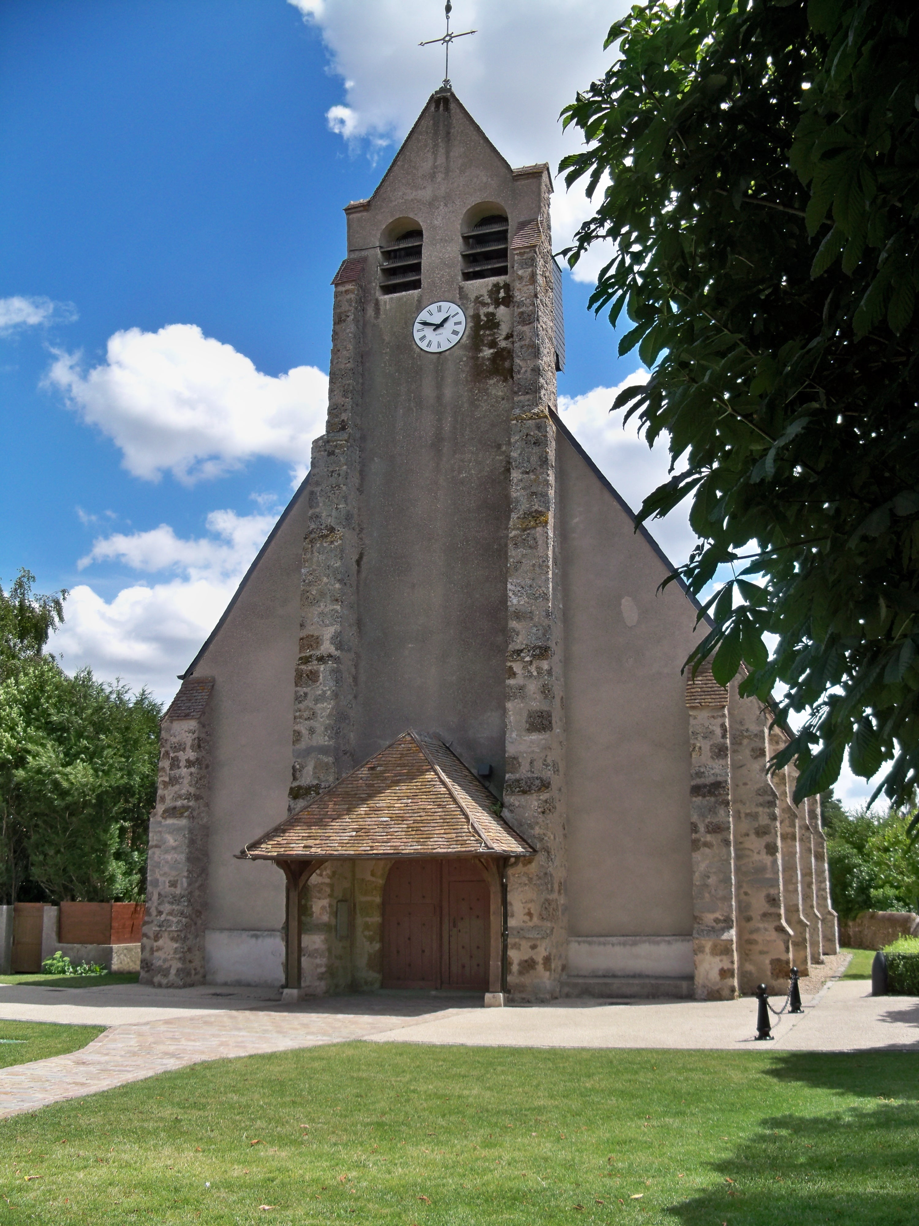 Facade de l'église de Pecqueuse, Essonne, France